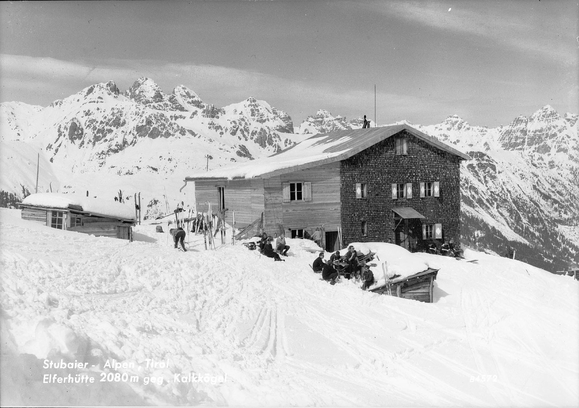 Elferhütte gegen Kalkkögel